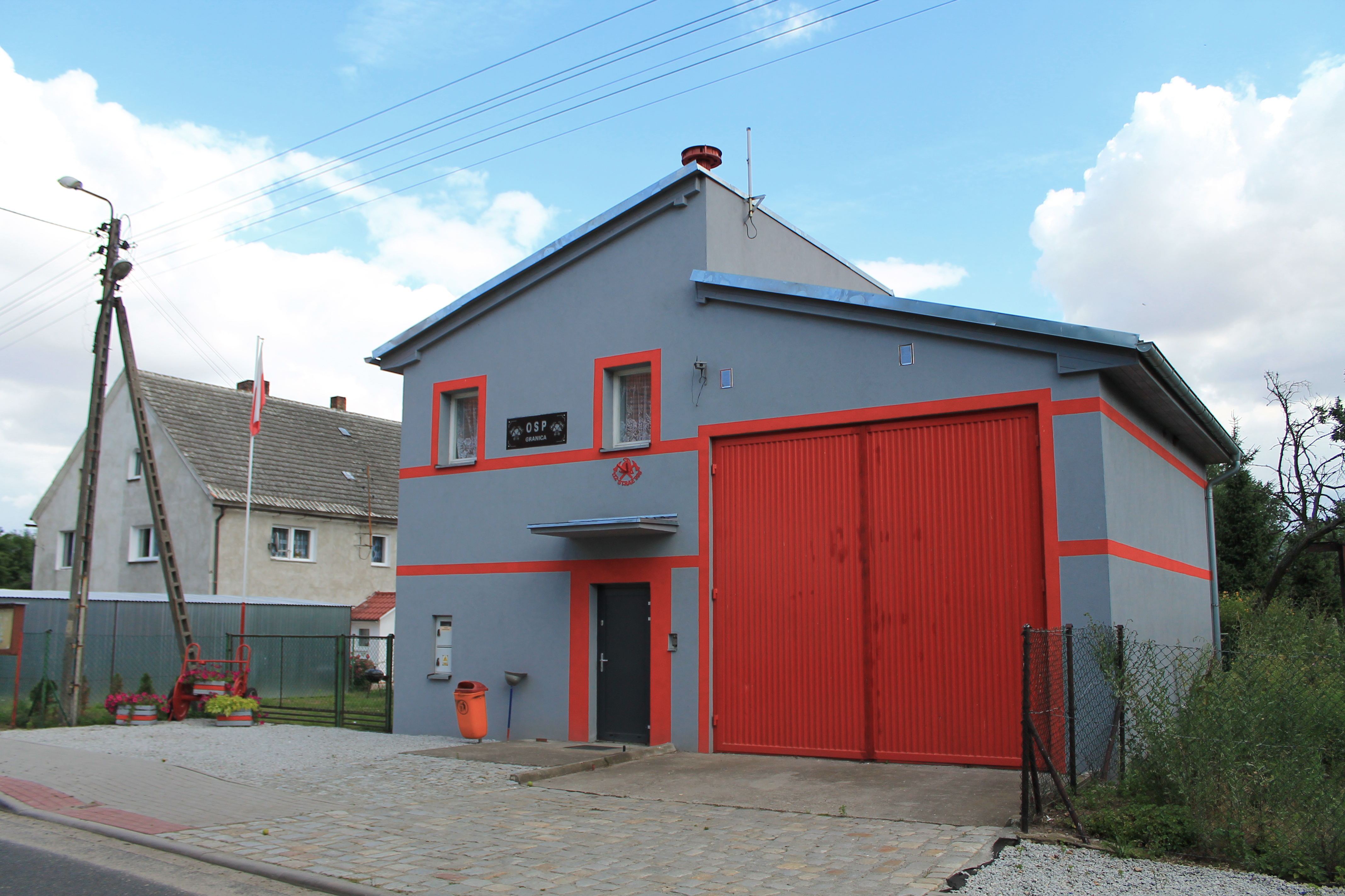 Granica, gmina Strzegom. Remiza Ochotniczej Straży Pożarnej